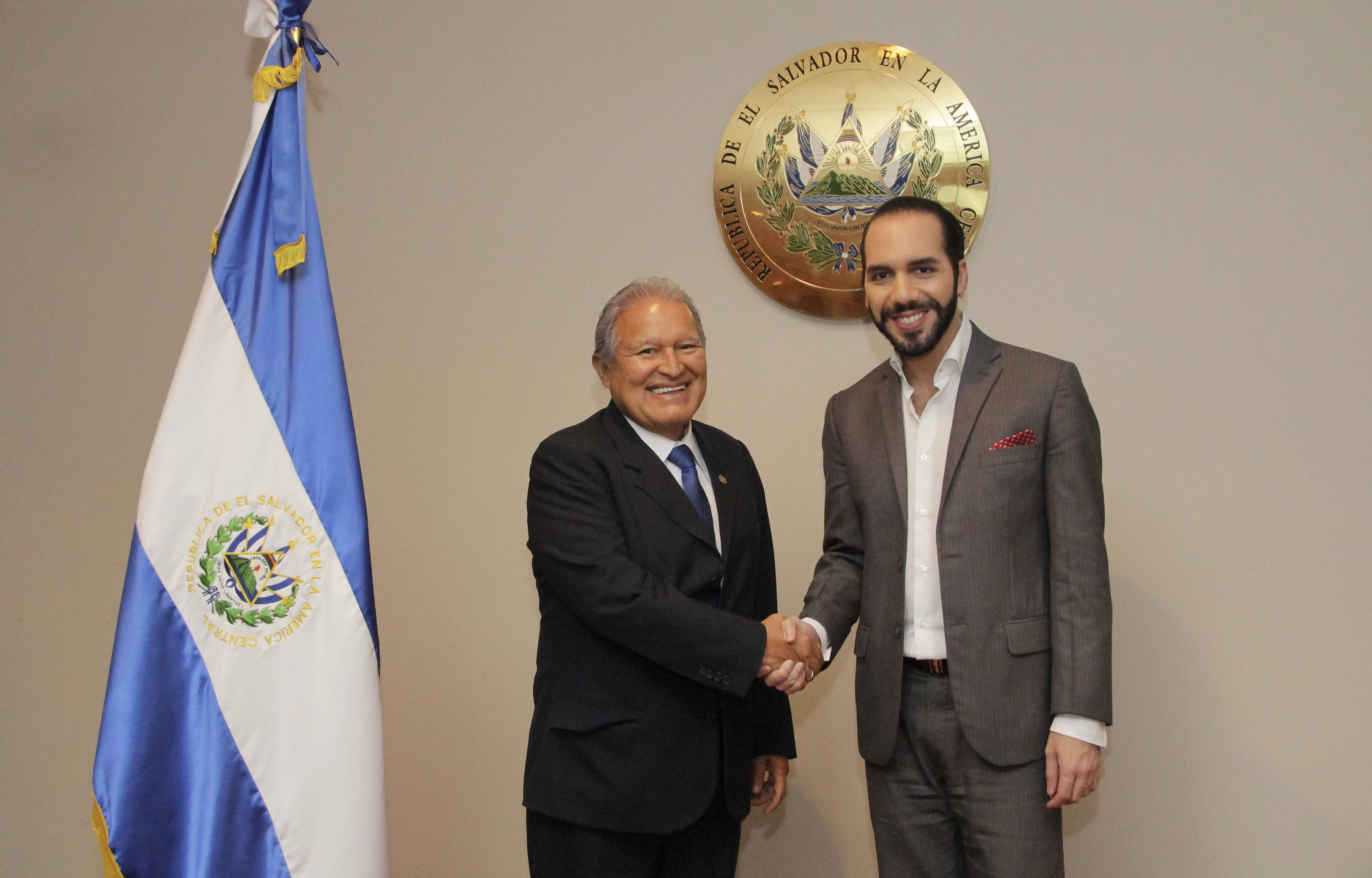 El presidente de El Salvador, Salvador Sánchez Cerén, y el alcalde de San Salvador, Nayib Bukele, durante una reunión sobre temas de cooperación entre el Gobierno central y la comuna capitalina.